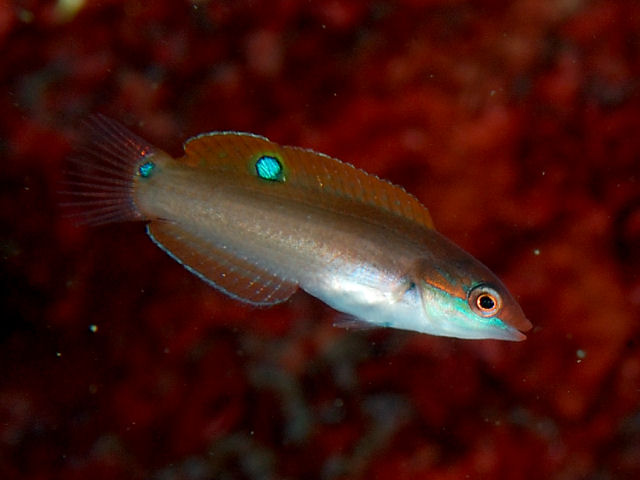 ホンベラ Halichoeres tenuispinis